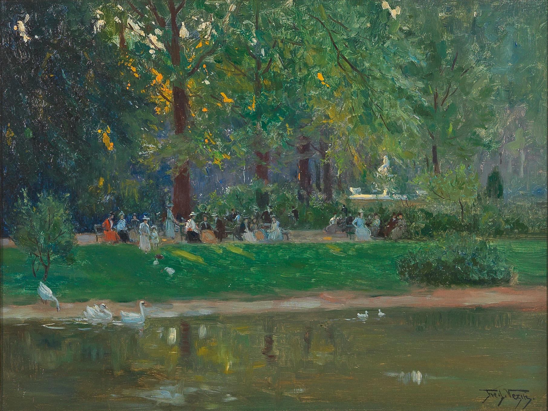 "Partie aus dem Hofgarten (am Kriegerdenkmal)" laut rückseitig alter Bezeichnung, signiert Fred. Vezin, Öl auf Leinwand, 35 x 46 cm